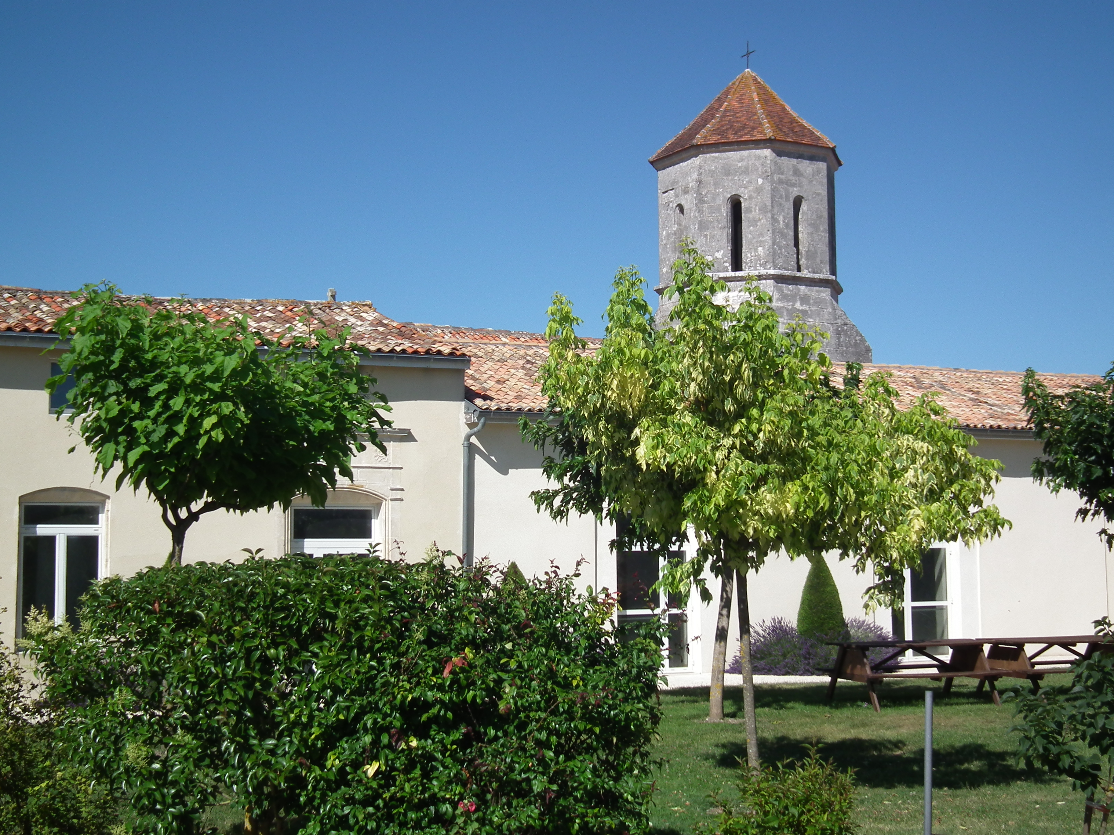 Le village de Clam